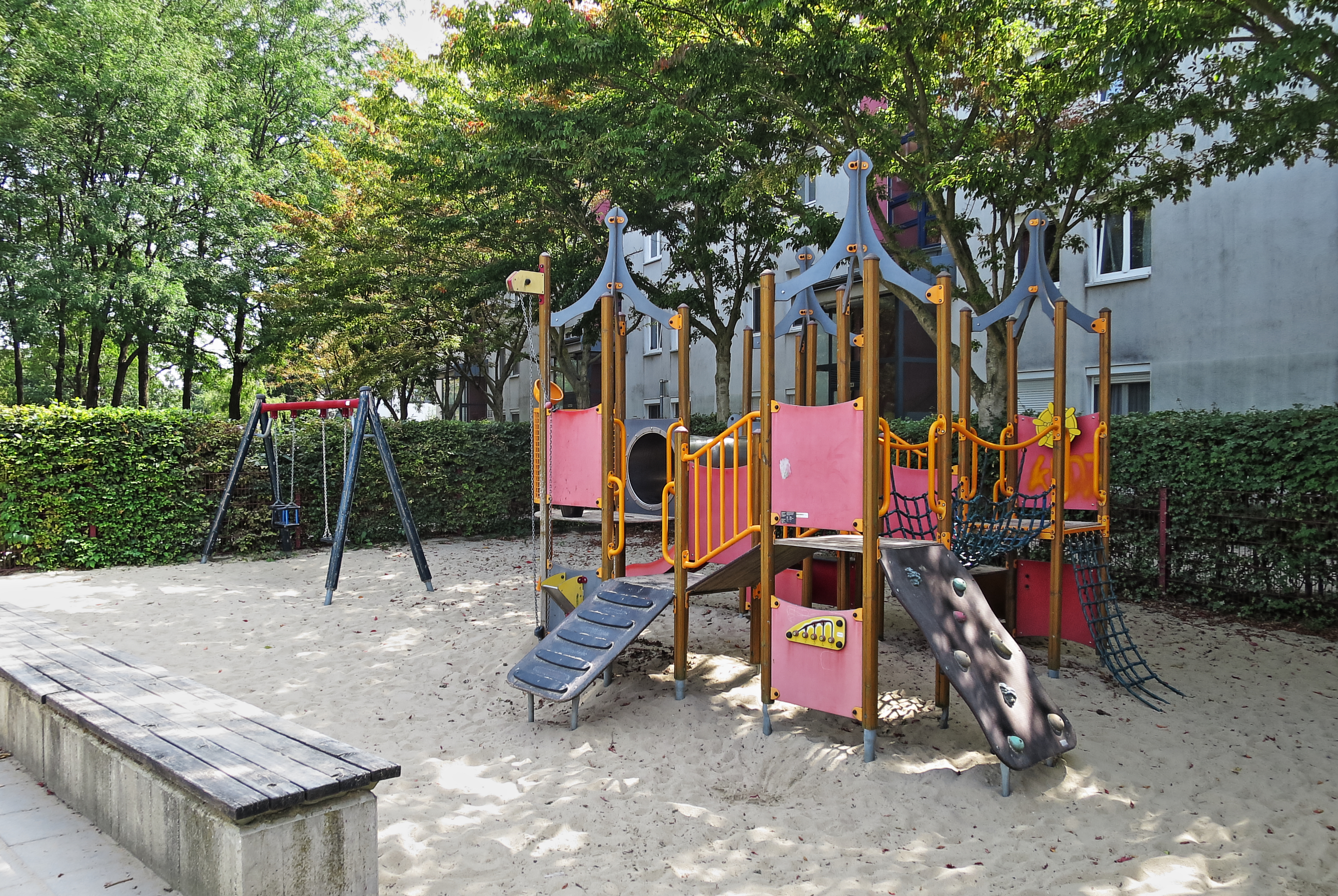 Wien-Donaustadt, Trygve-Lie-Park, Spielplatz